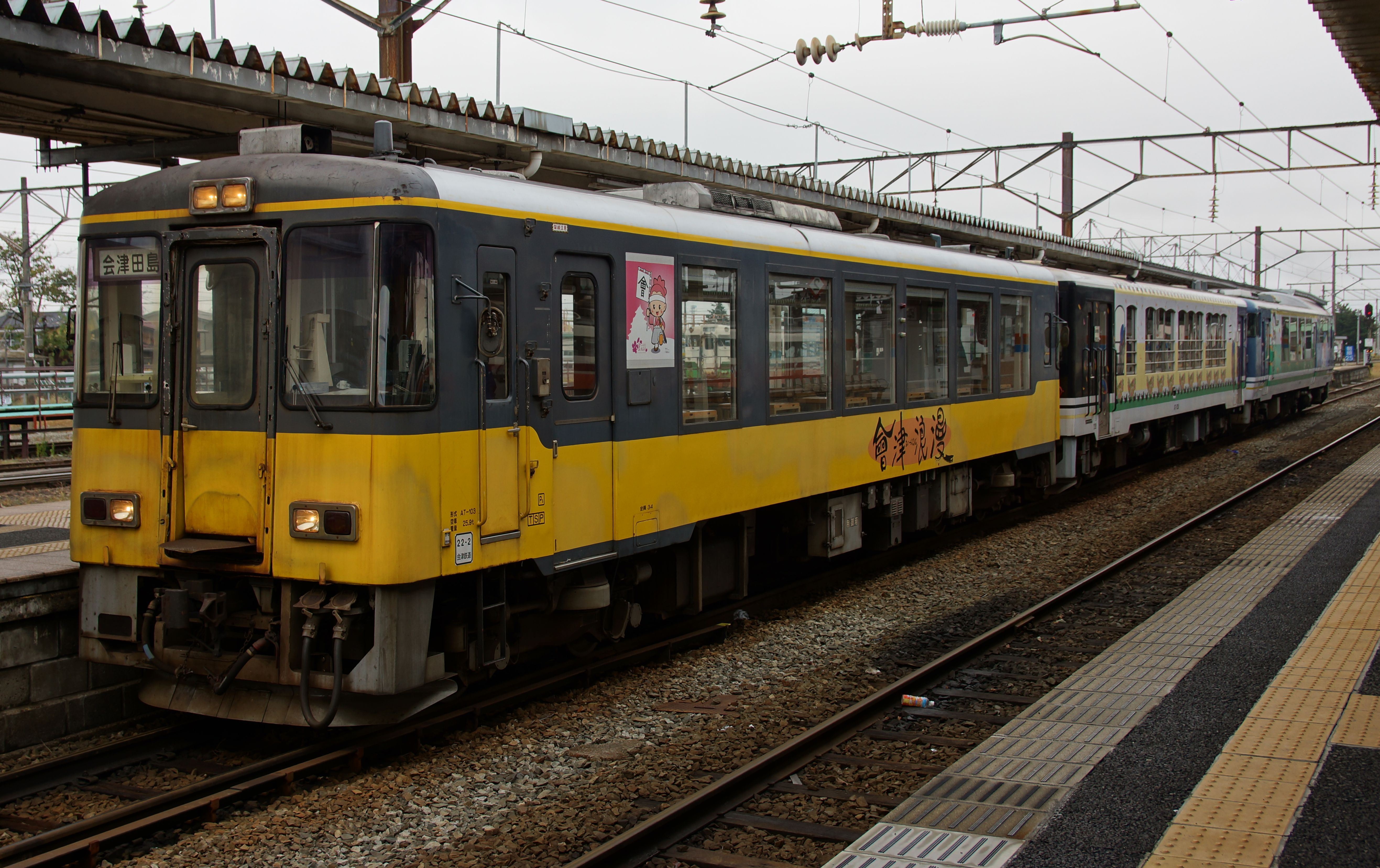 会津若松駅停車中の会津浪漫号